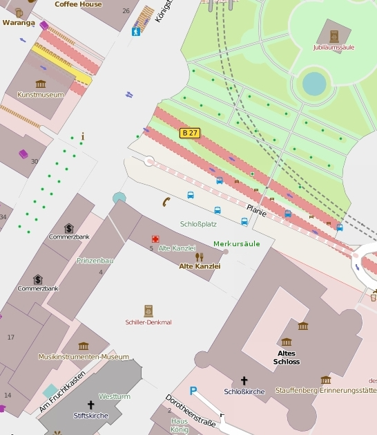 Stadtplan von Stuttgart, Ausschnitt mit der Alten Kanzlei und der Merkursäule (= Alter Wasserturm).